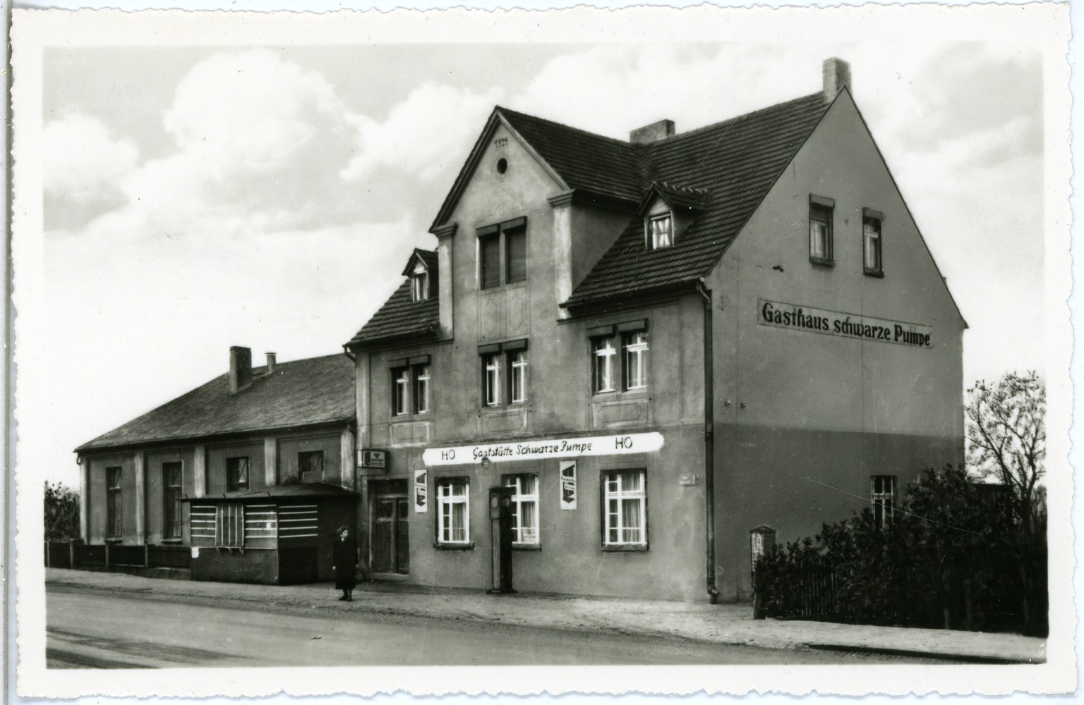 Spremberg; Gasthof schwarze Pumpe This postcard is from publisher Brück & Sohn in Meißen ( postcard has a unique number 29556 and is available in a higher resolution at the publisher. This images was uploaded in a cooperation project between Wikipedians and the publisher.